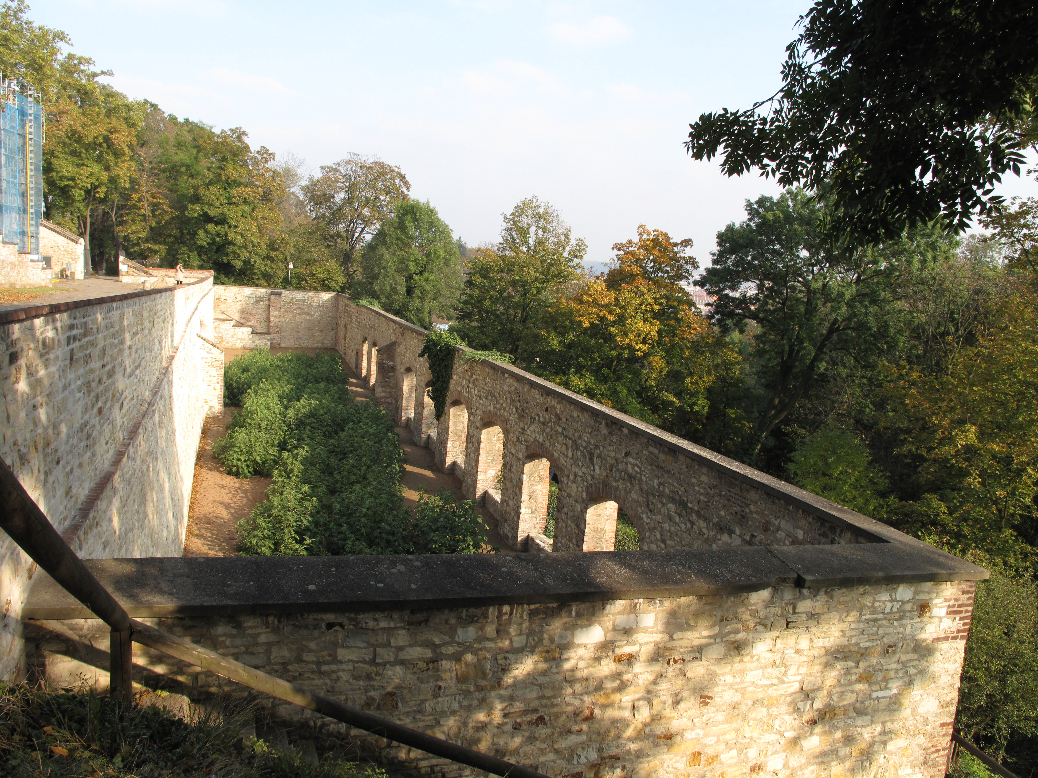 Hradčany, Praha, Česká republika.